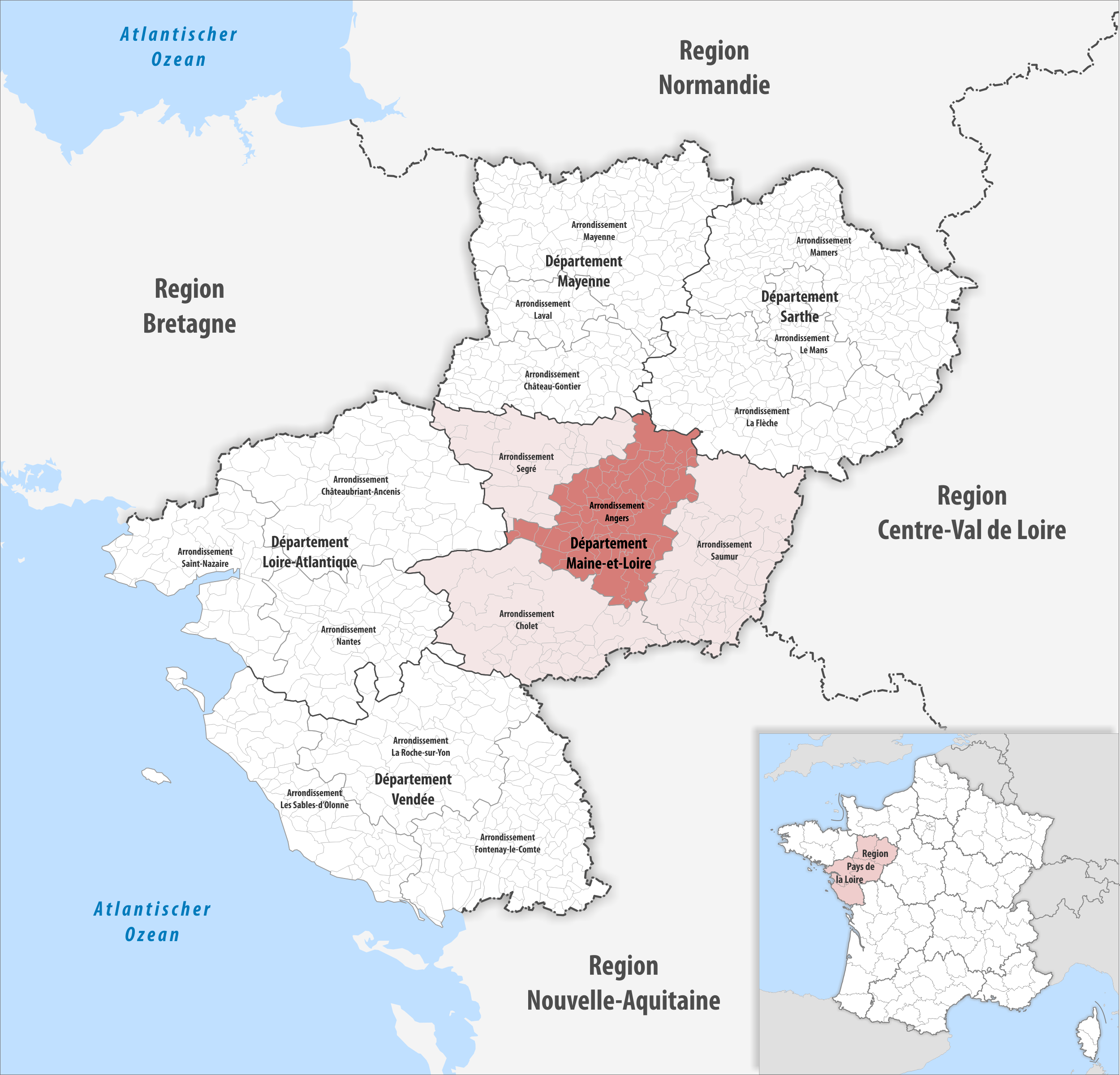 Lage des Arrondissements Angers